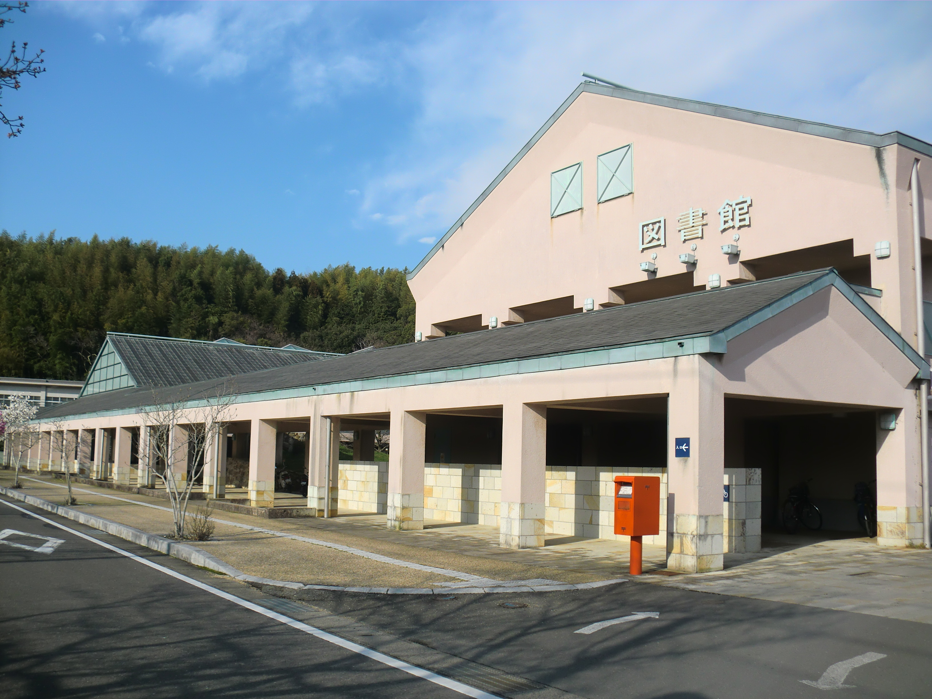 佐賀県伊万里市にある伊万里市民図書館